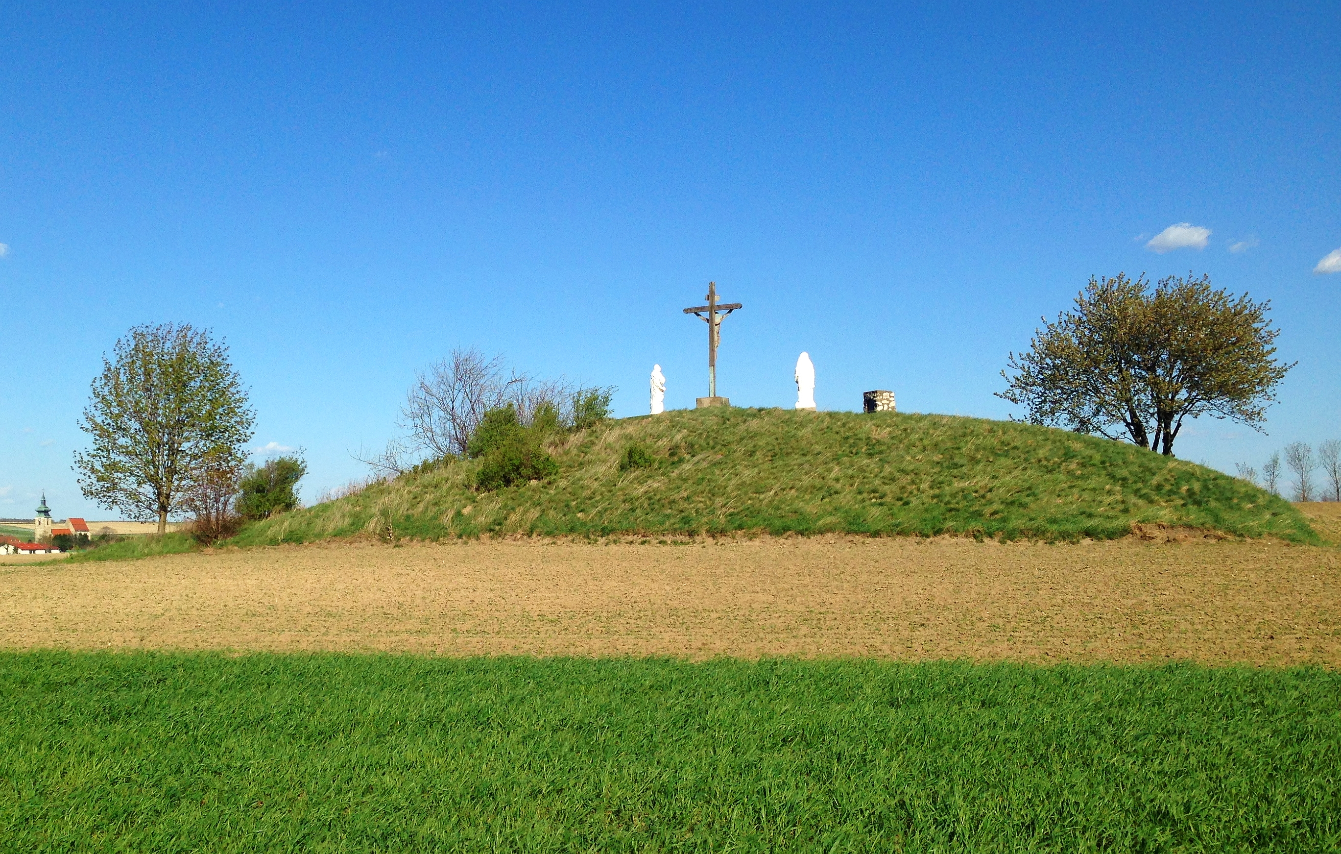 Tumulus und Kalvarienberg in Pillichsdorf, Niederösterreich, Österreich